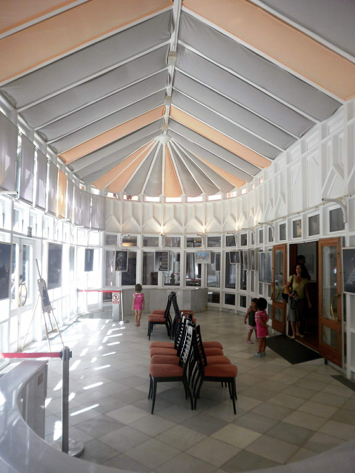 Capricho de Gaudí (Comillas)